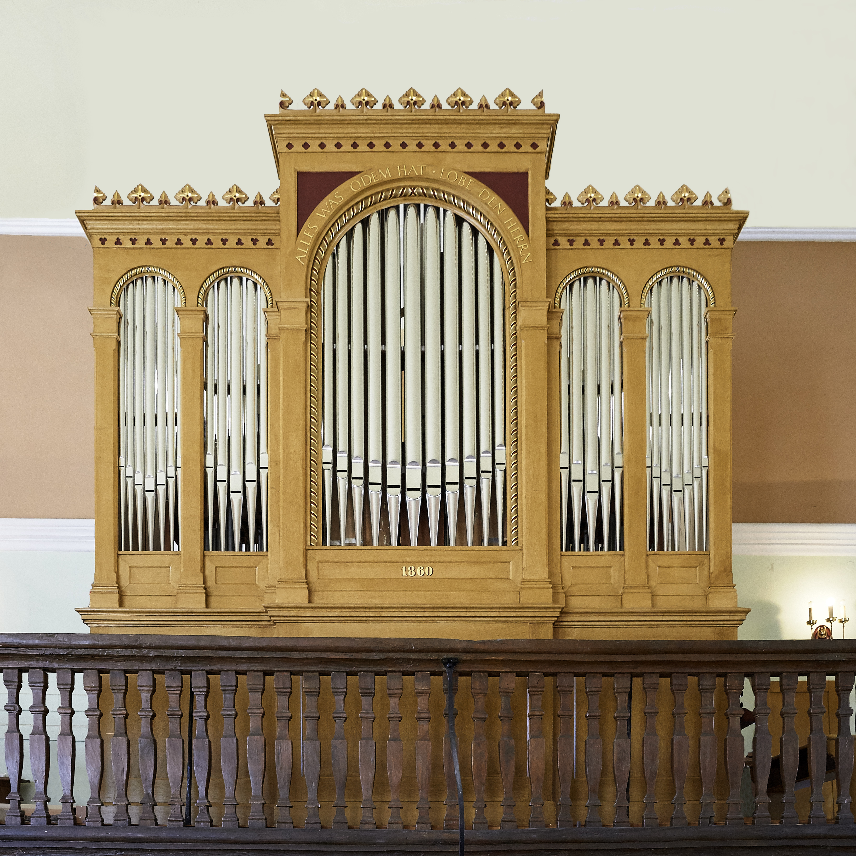 Das nach der Restaurierung wieder ursprüngliche Aussehen der Walcker-Orgel der Christuskirche Mimbach